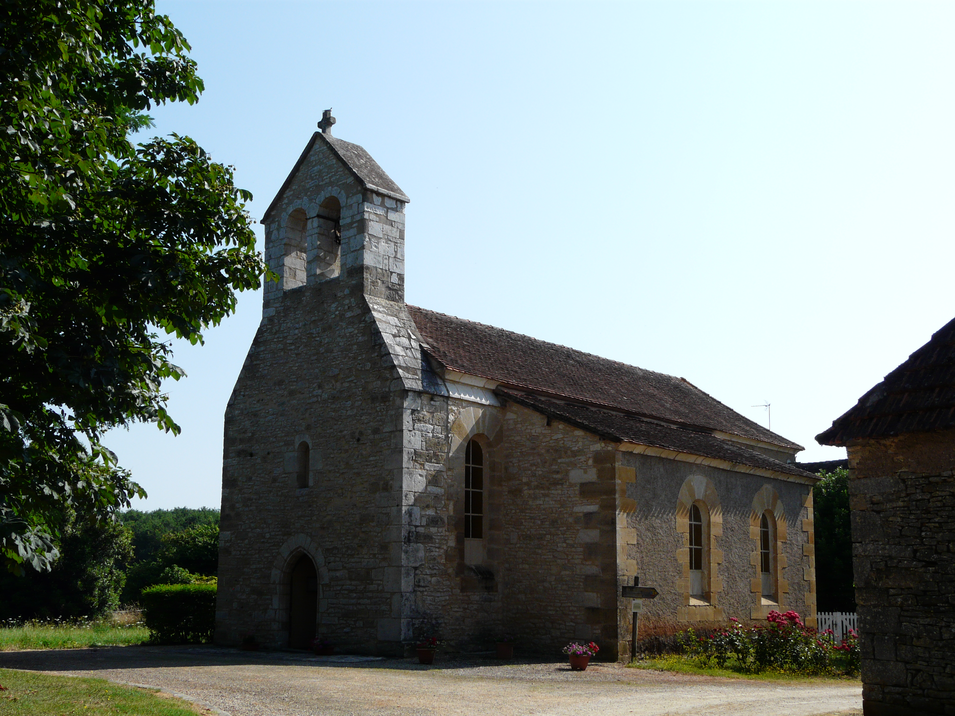 L'église Saint-Sulpice de Chourgnac, Dordogne, France.